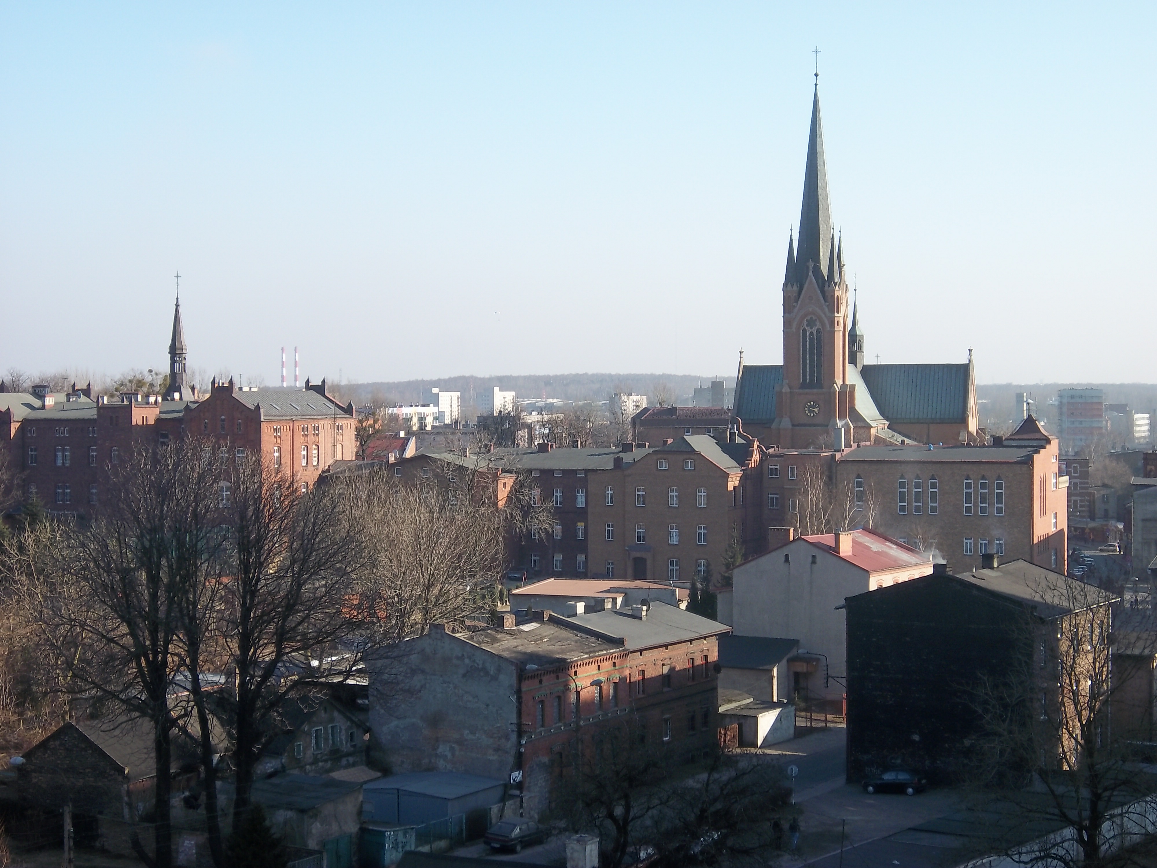 Katowice Bogucice